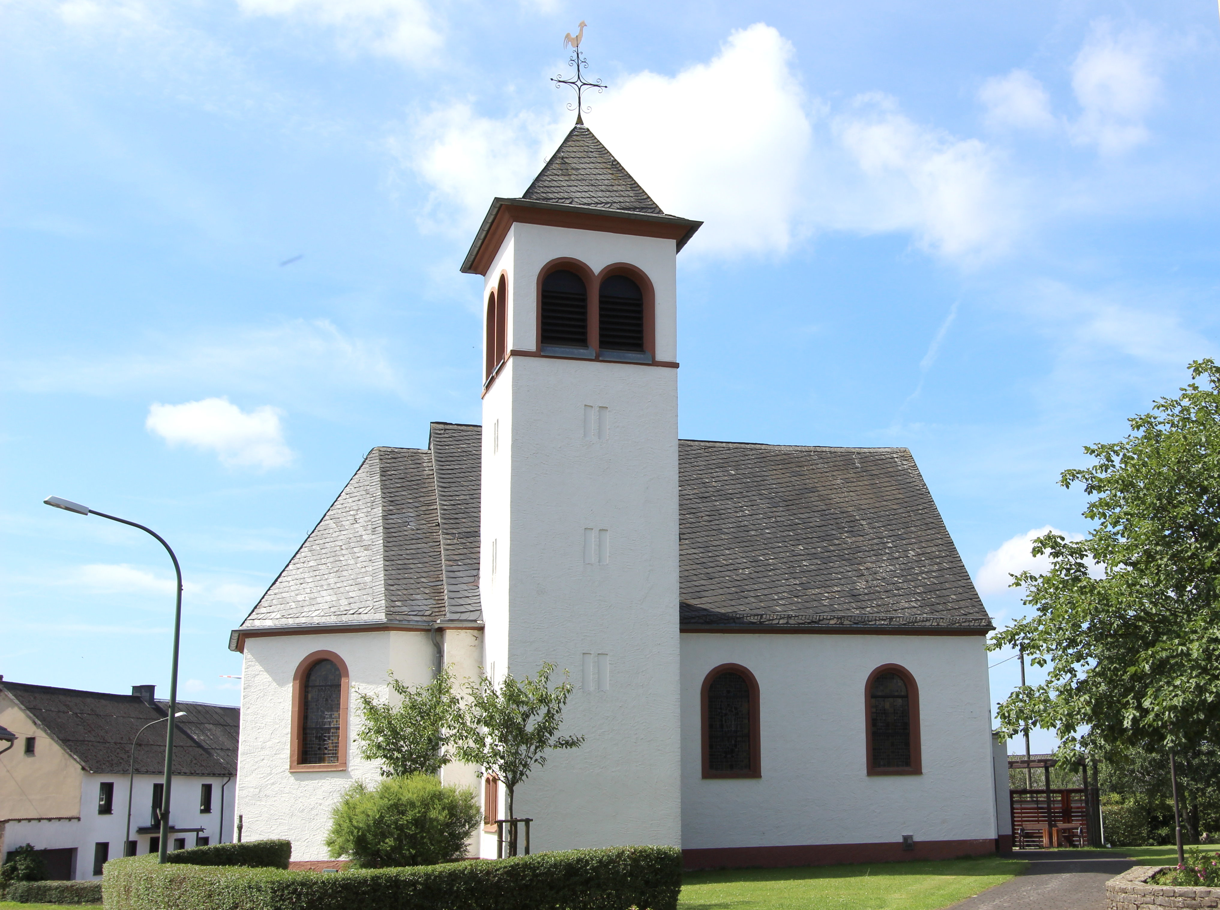 54597 Reuth, Dorfstraße. Die einschiffige Kapelle von 1950 mit einem an der Nordseite angebauten Glockenturm von 1972. An der Ostwand des Chorraumes befindet sich, durch den Altar verdeckt, ein noch erhalten gebliebenes gotisches Sakramentshäuschen. Aufnahme von 2017.